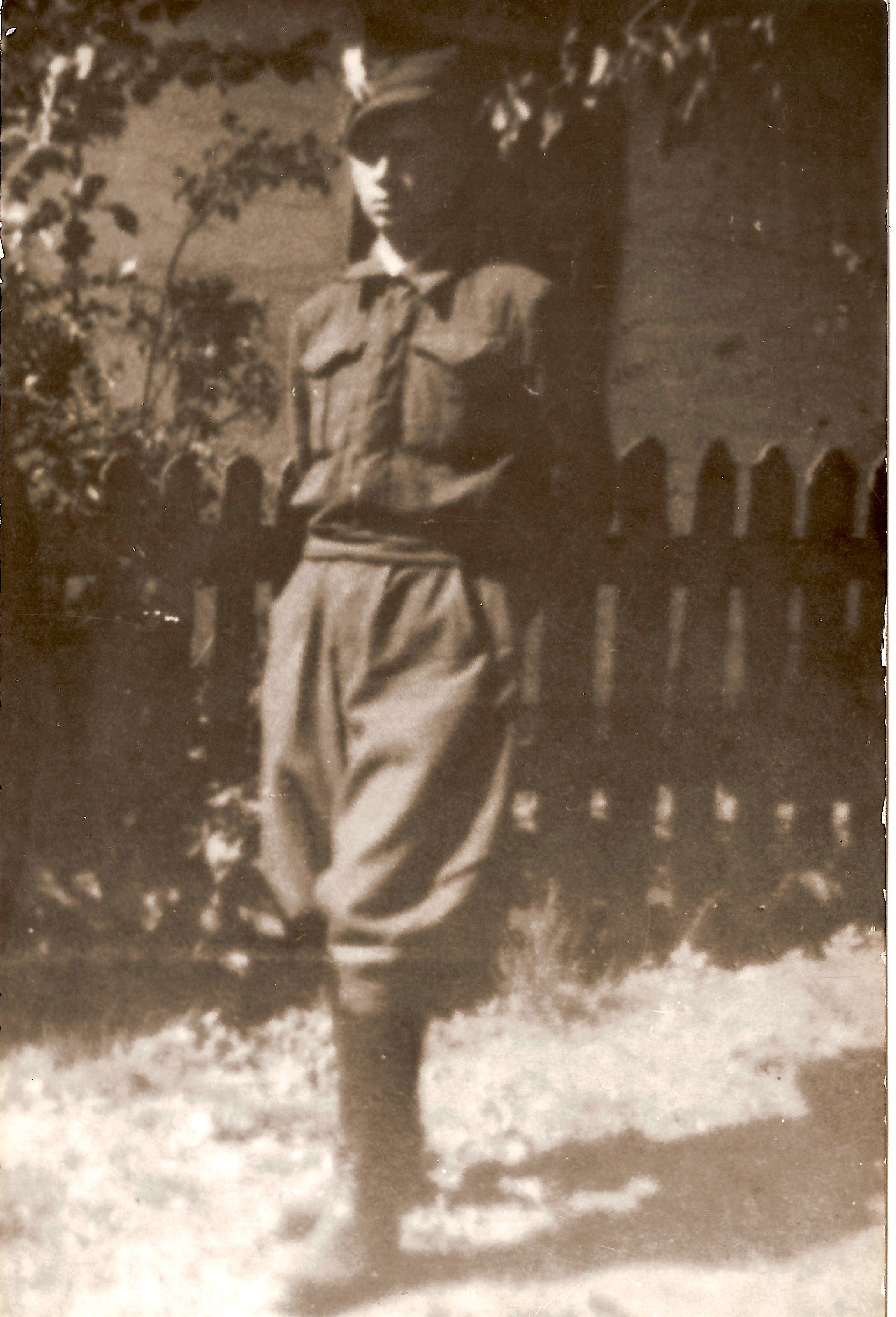 Żołnierz Oddziału Leśnego "Lech" - Pantera